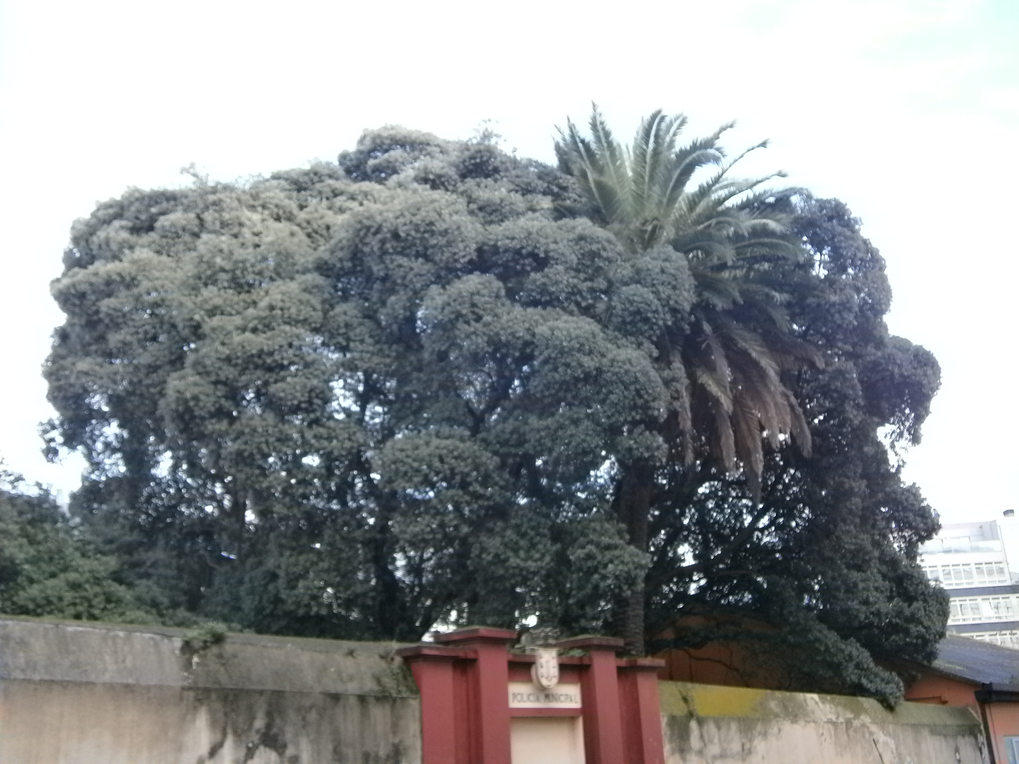 Árbore das bruxas na polícia local da Coruña (árbore senlleira de Galicia)